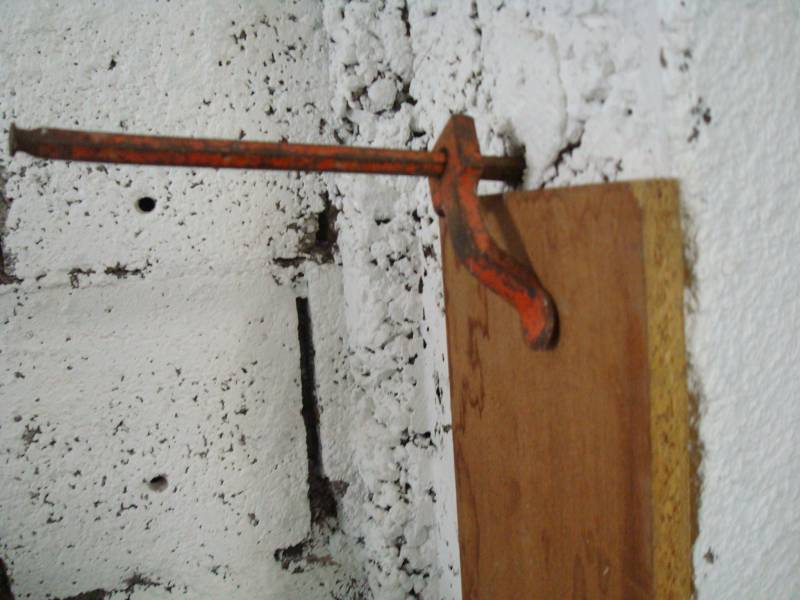 Chevillette (serre-joint de maçonnerie)